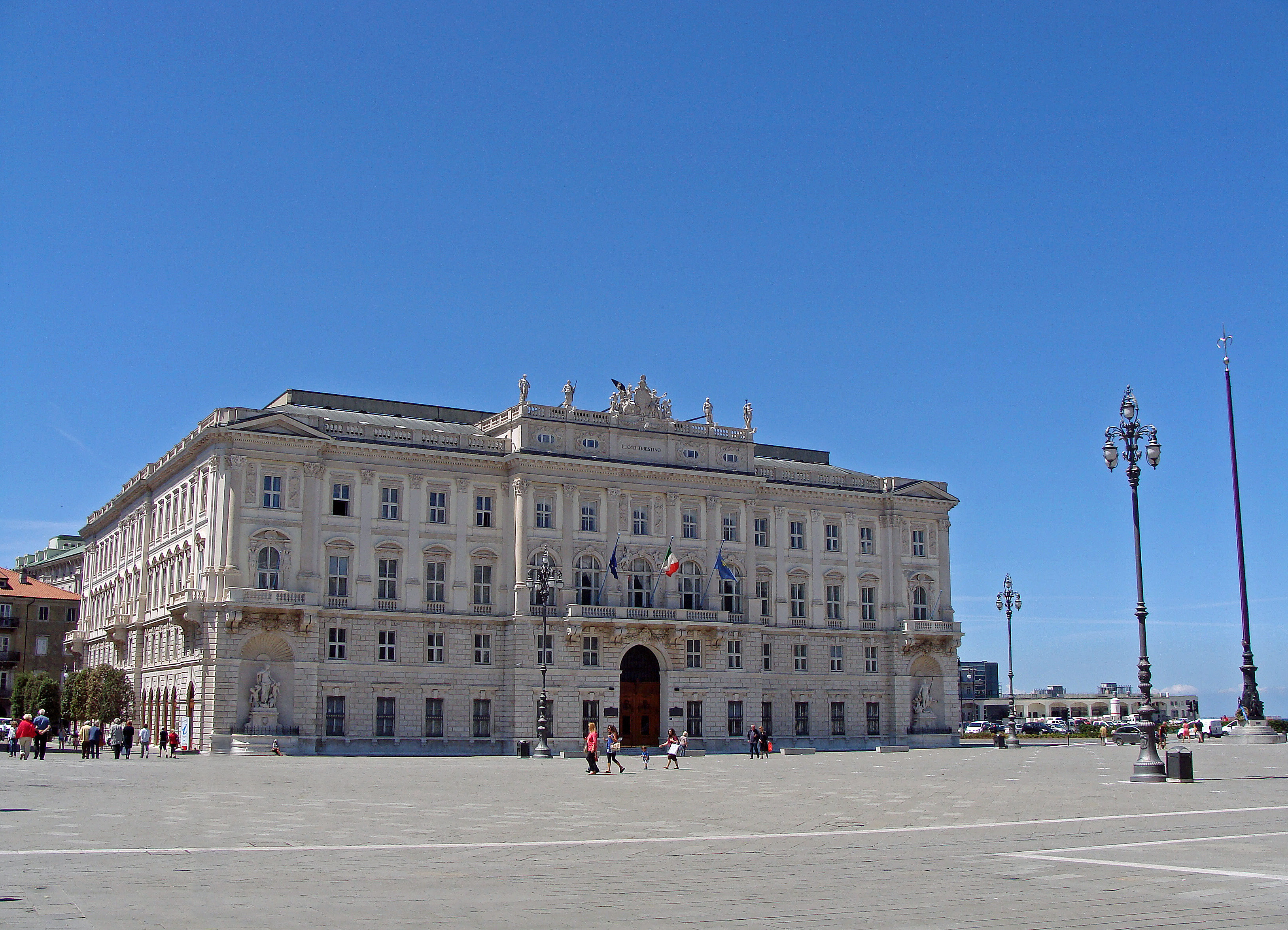 Trieste: Lloyd Austro-Ungarico.